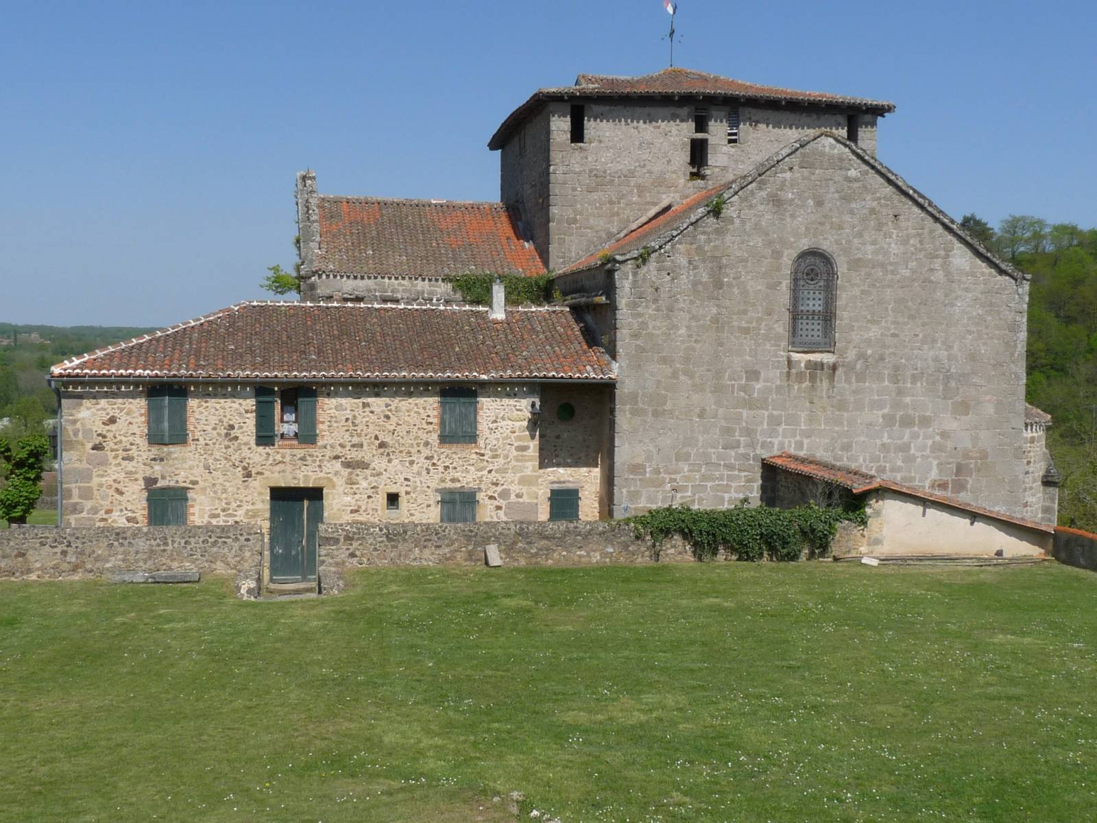 Eglise de St-Germain-de-Confolens, Charente, France